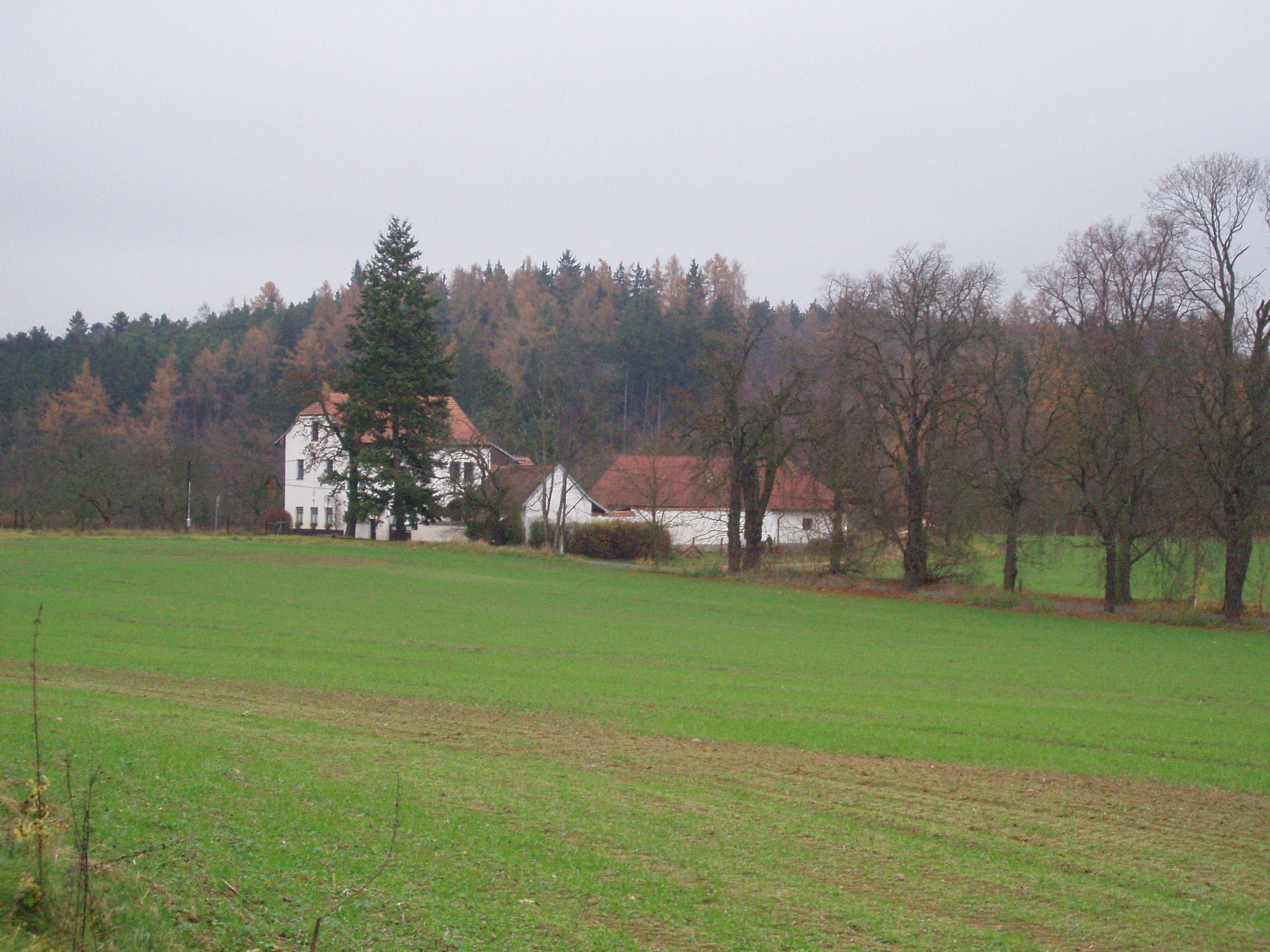 Osada Bělohrad